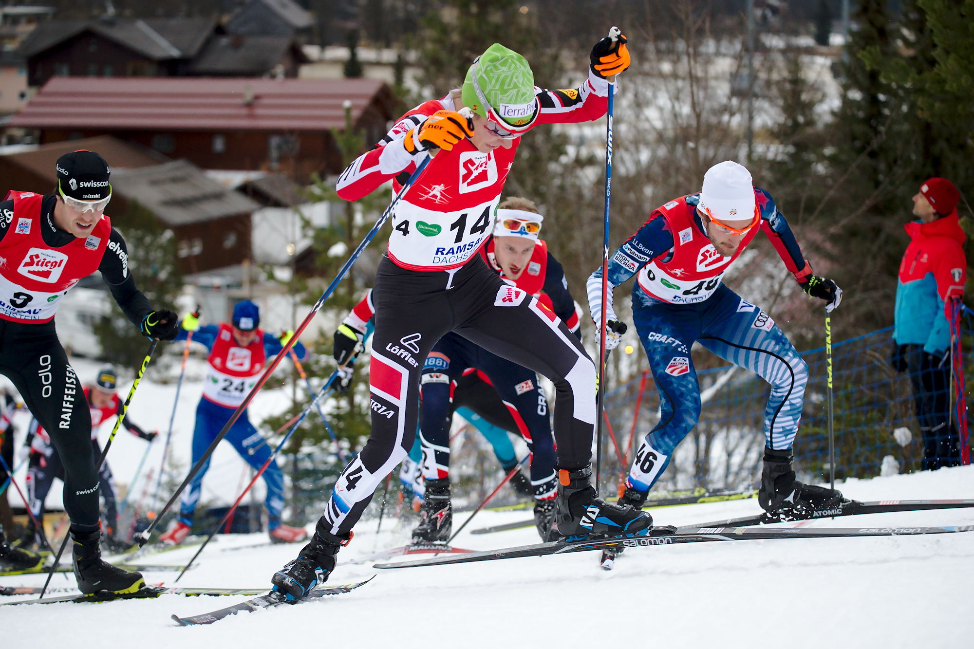 FIS Worldcup Nordic Combined Ramsau 2016. Bild zeigt Franz-Josef Rehrl (AUT)